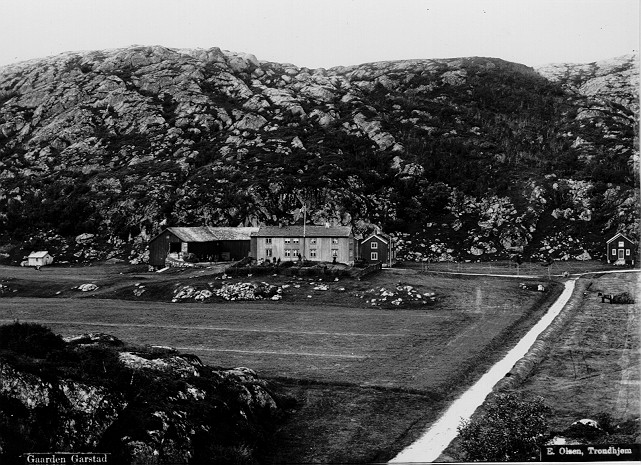 Garstad gård i Vikna.